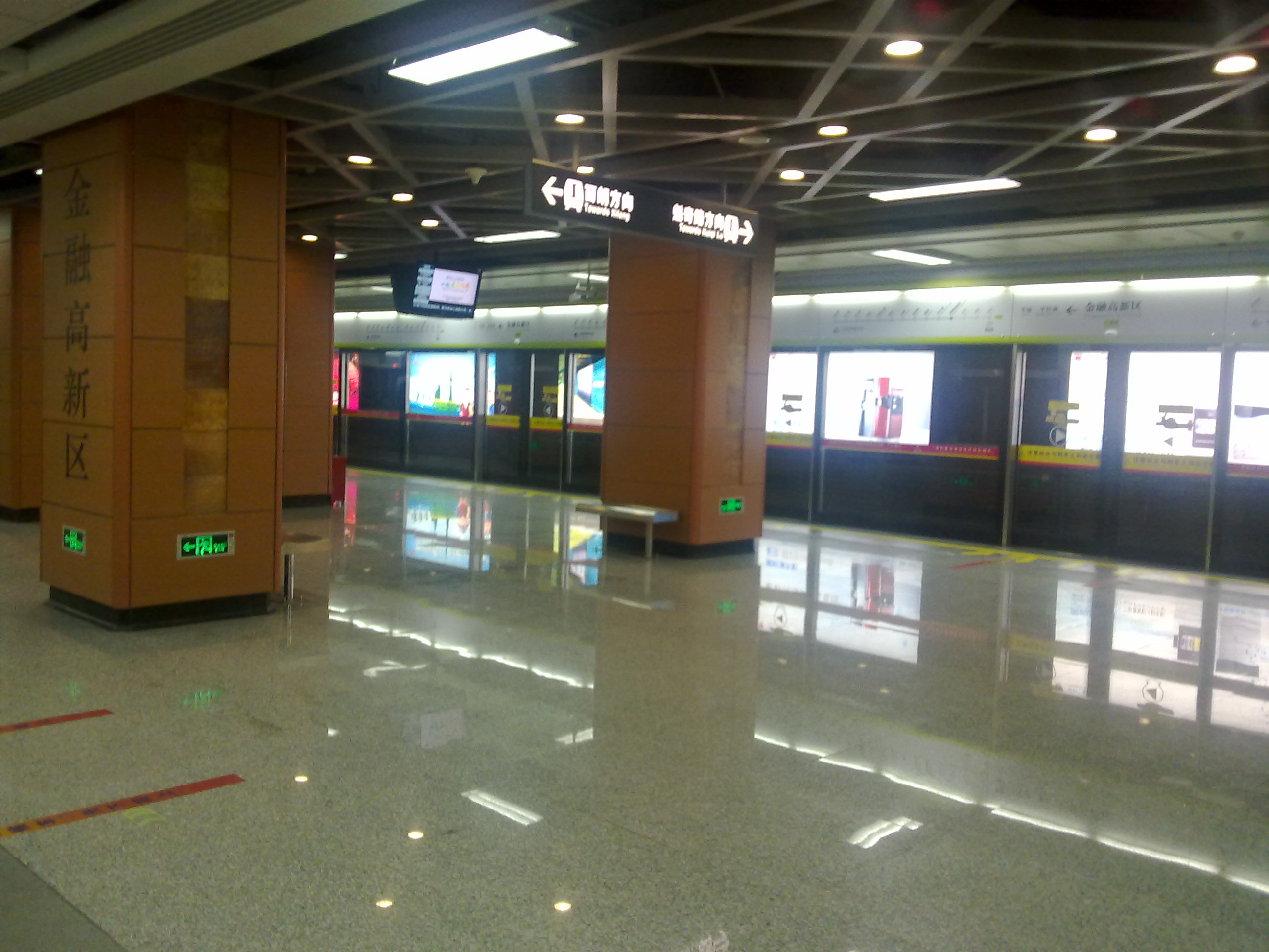 廣佛地鐵金融高新區站站台